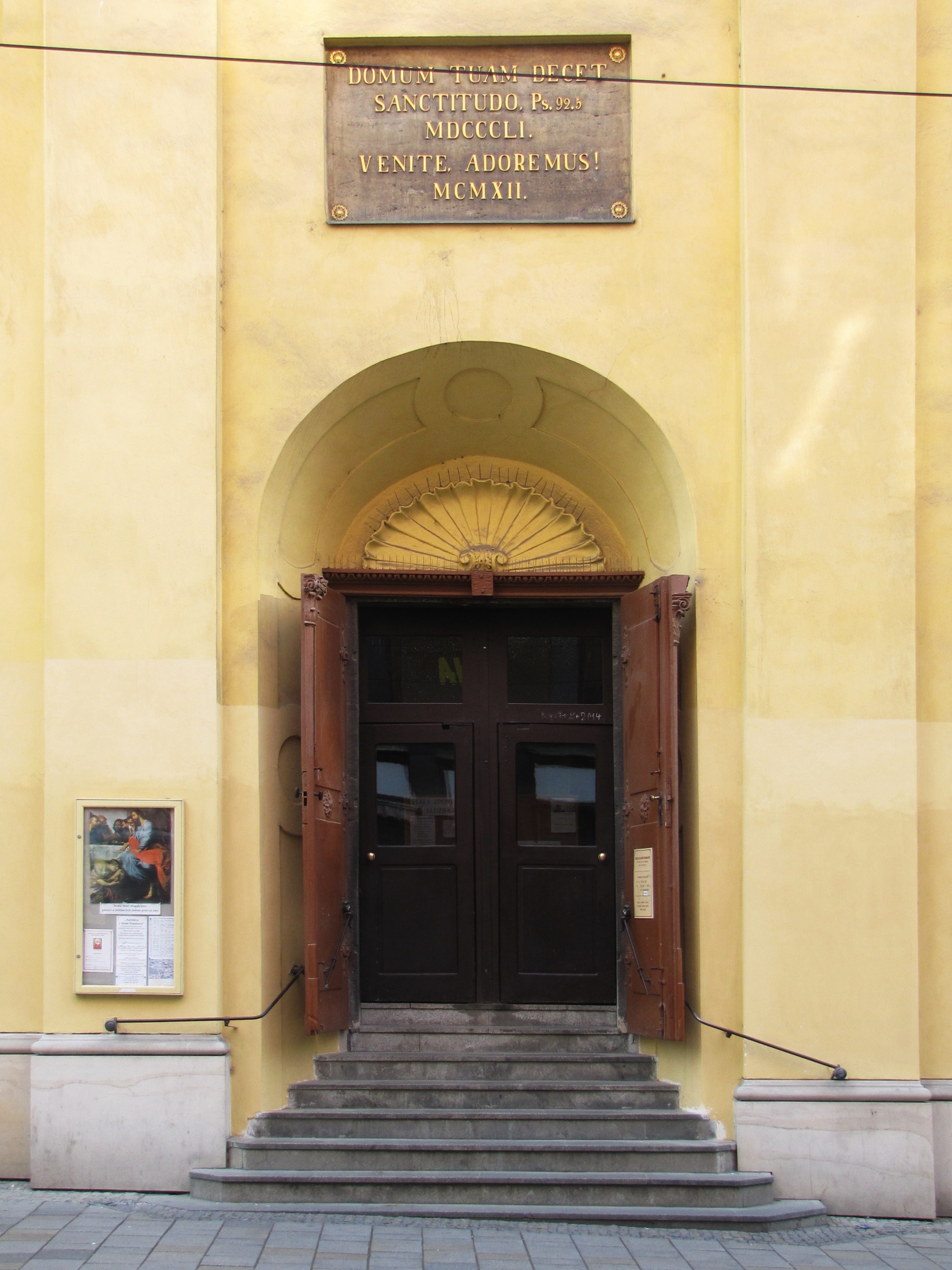 Vchod do kostela svaté Máří Magdalény v Brně